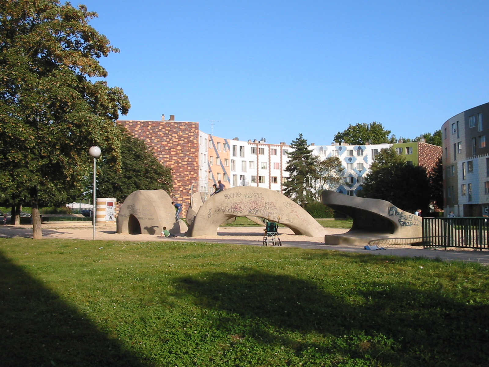 Ile-de-France / Essonne / Grigny / Quartier de la Grande Borne / Sculpture du Serpent de Mer